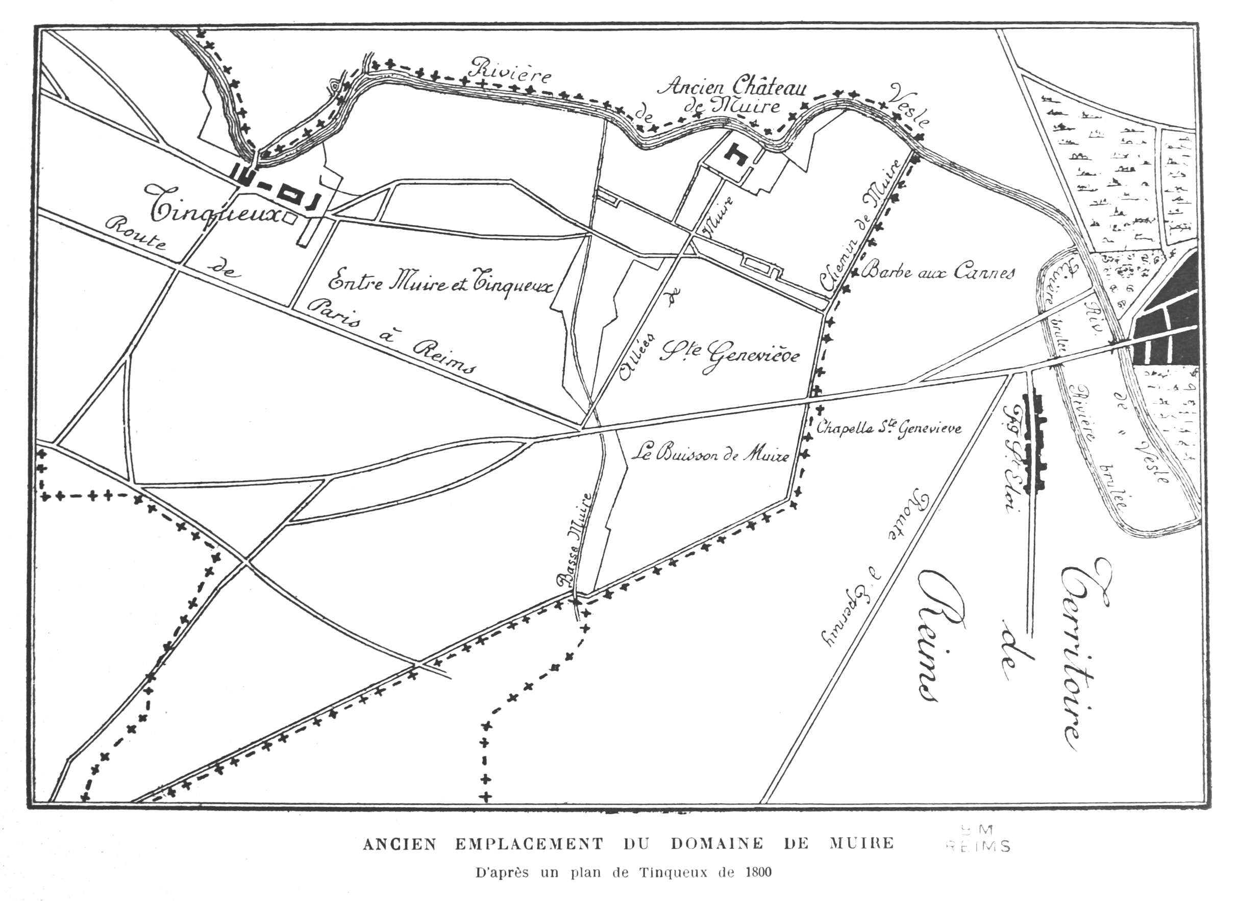 l'ancienne Église de Tinqueux collection de la BMR cote CXXVI 4209.